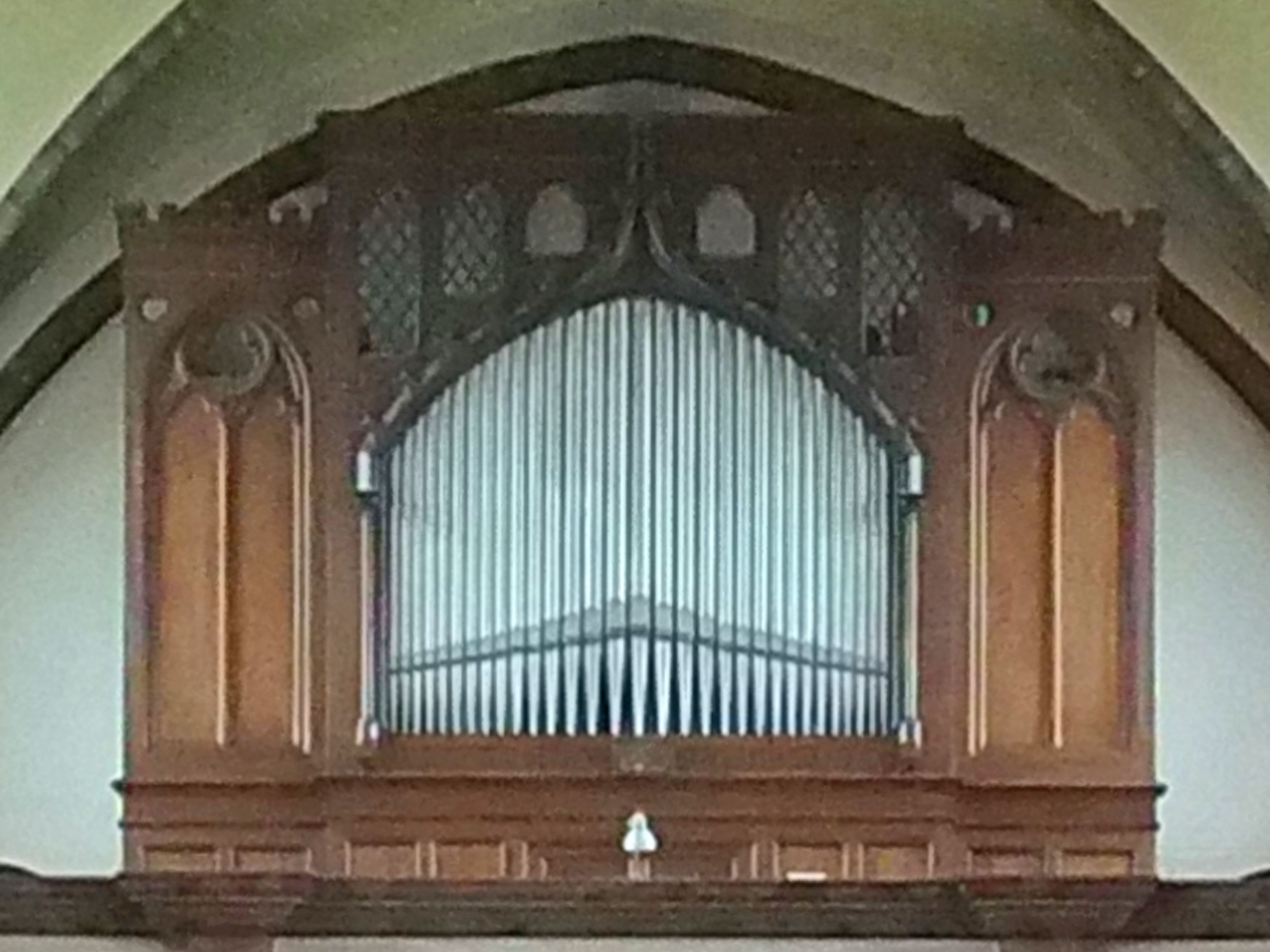 Orgel der kath. Kirche St Joseph in Braunschweig.